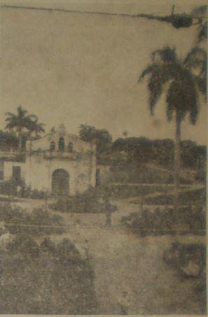 La Imagen muestra una vista del Parque de Melena y al fondo la actual Iglesia Católica de ese entonces (1937).